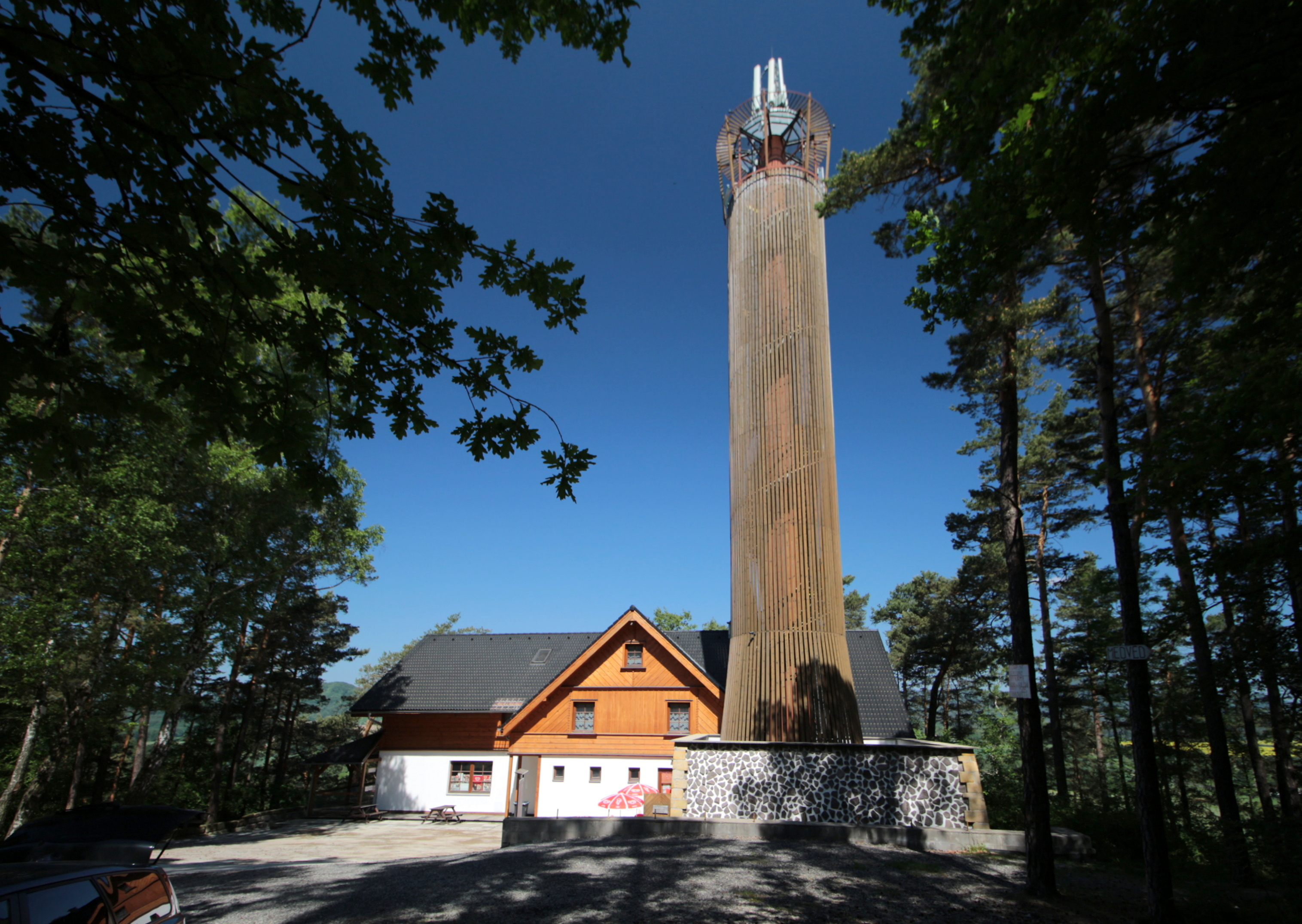 Rozhledna Na Stráži